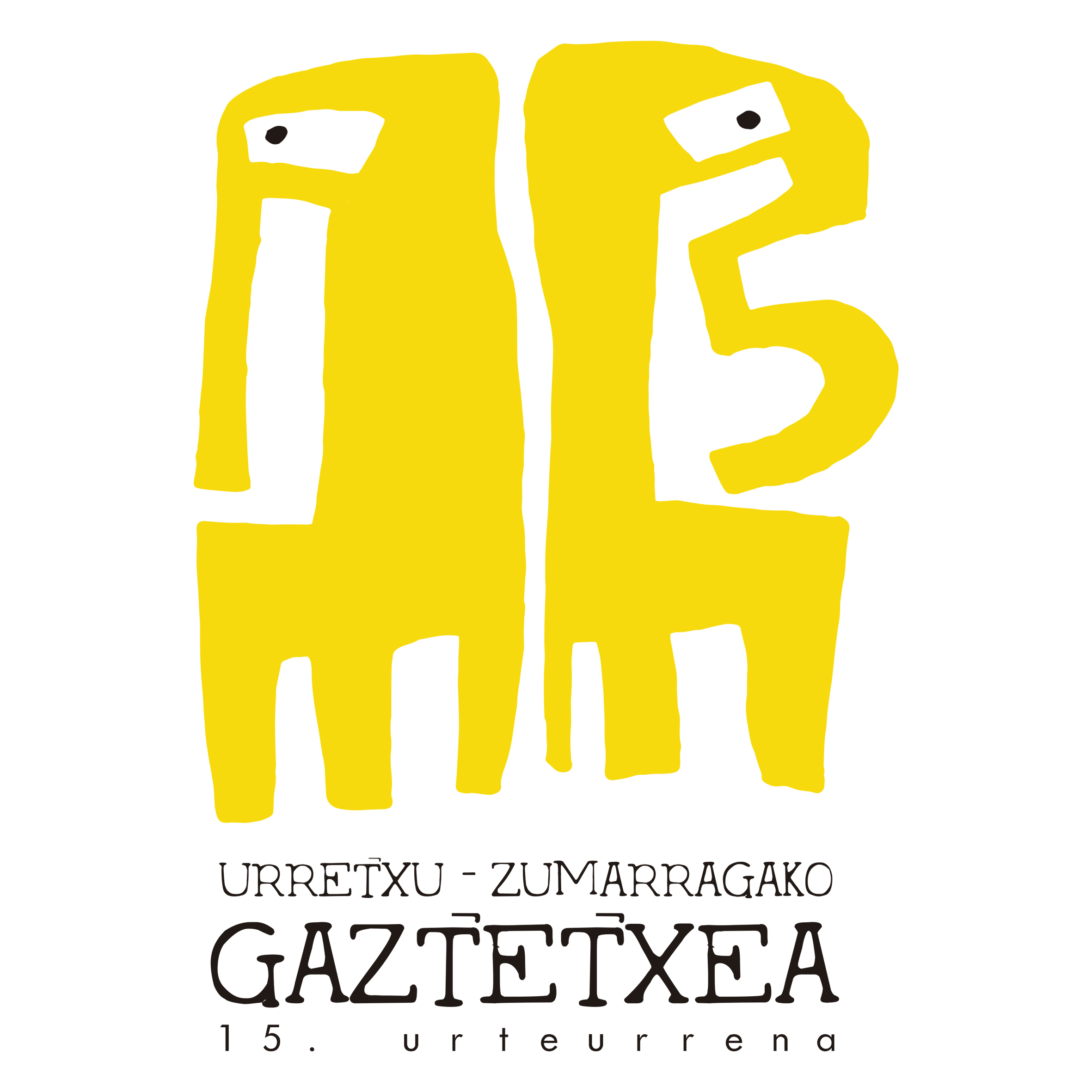 Urretxu-Zumarragako gaztetxearen 15. urteurreneko logoa.